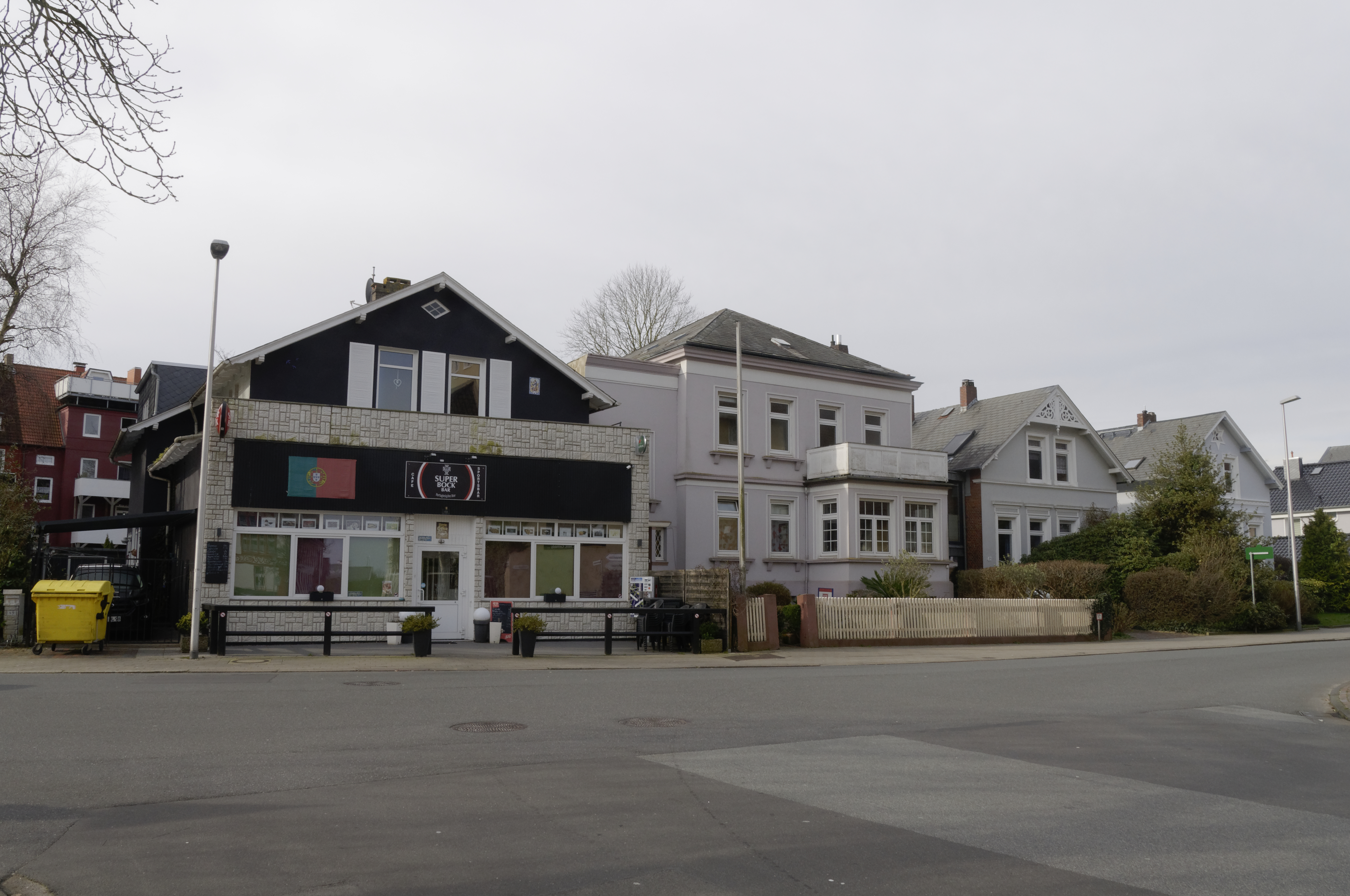 Cuxhaven 2020 -Marienstraße